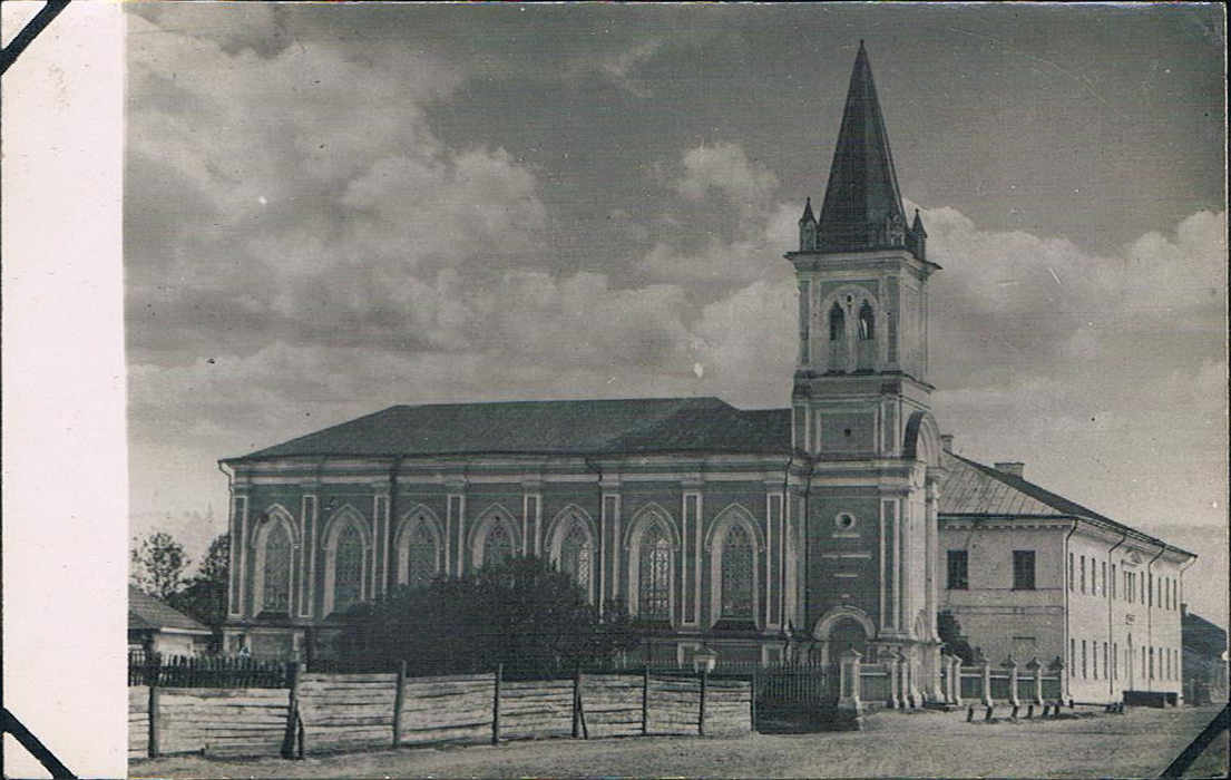 Беларуская (тарашкевіца): Слуцак (Słucak), вуліца Сэнатарская (vulica Senatarskaja). Збор і гімназія